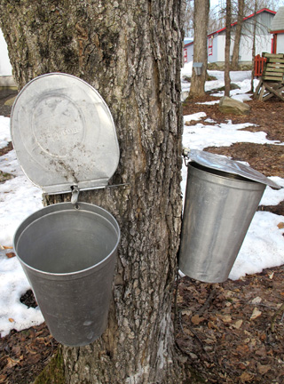 Seaux [chaudière au Québec) pour la récolte traditionnelle de l'eau d'érable. Québec, Canada